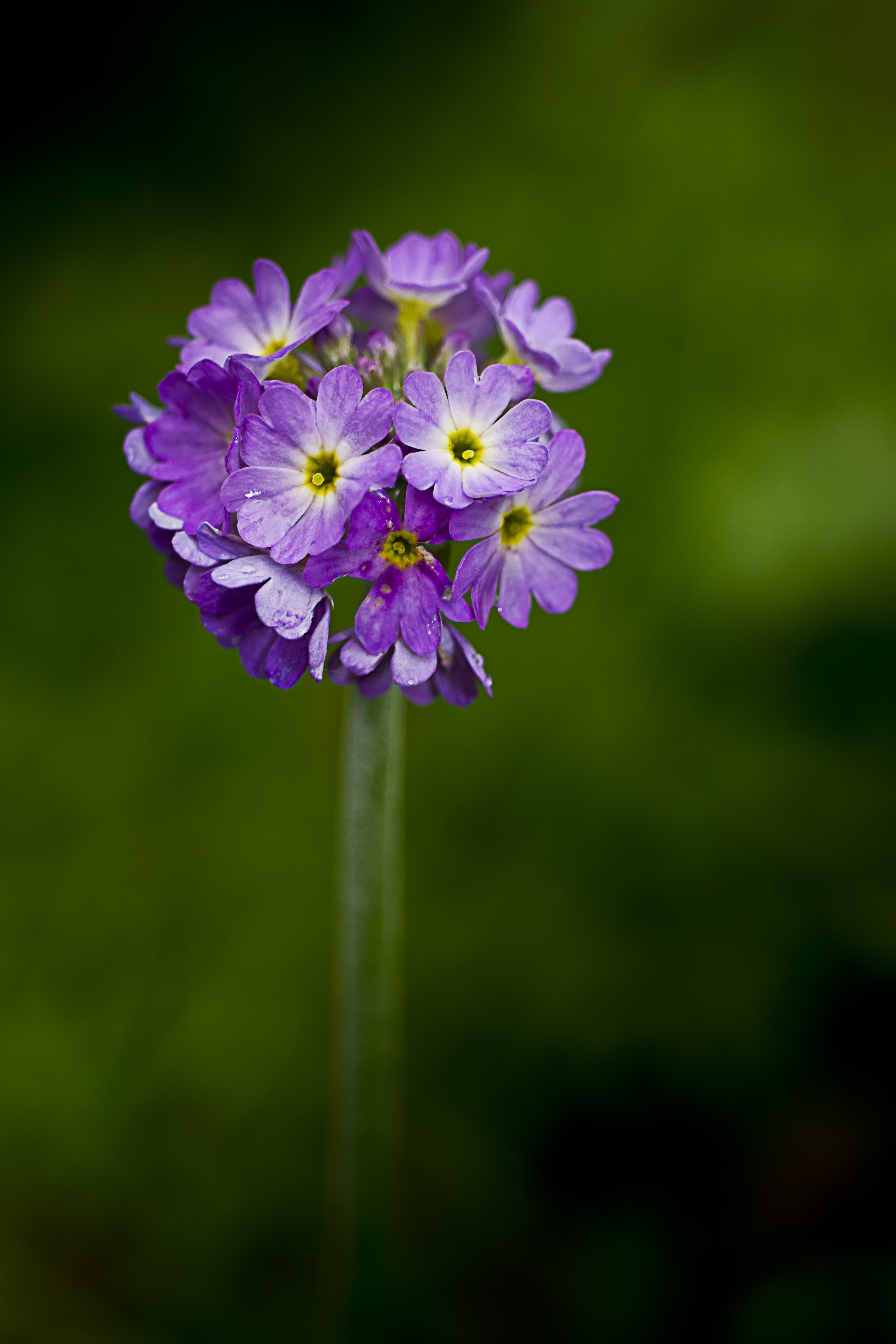 Bursa / Uludağ